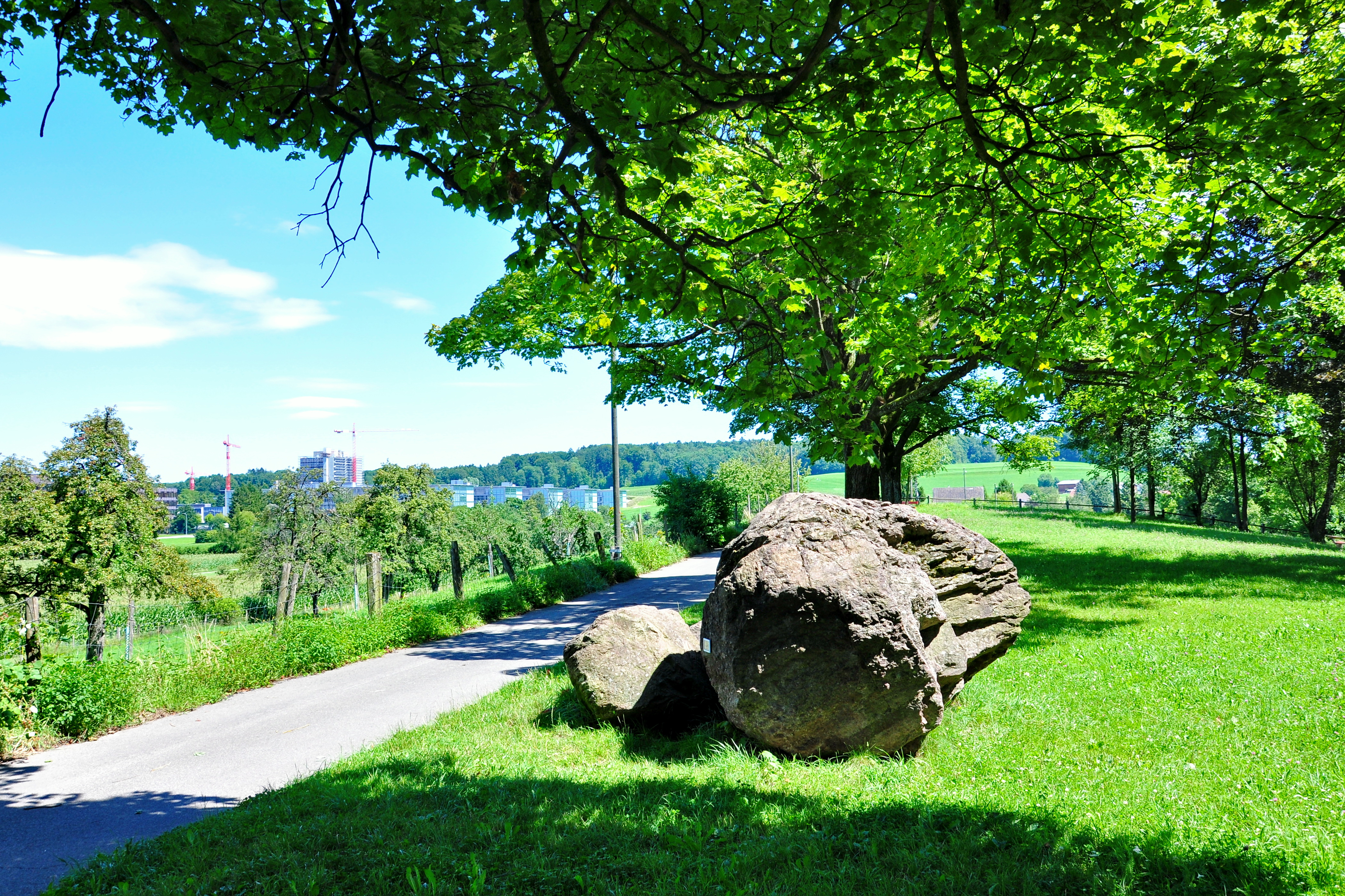 Findlingsgarten Kappenbühl in Zürich-Höngg, ETH Hönggerberg and Käferberg-Waidberg (to the right) in the background (Switzerland)